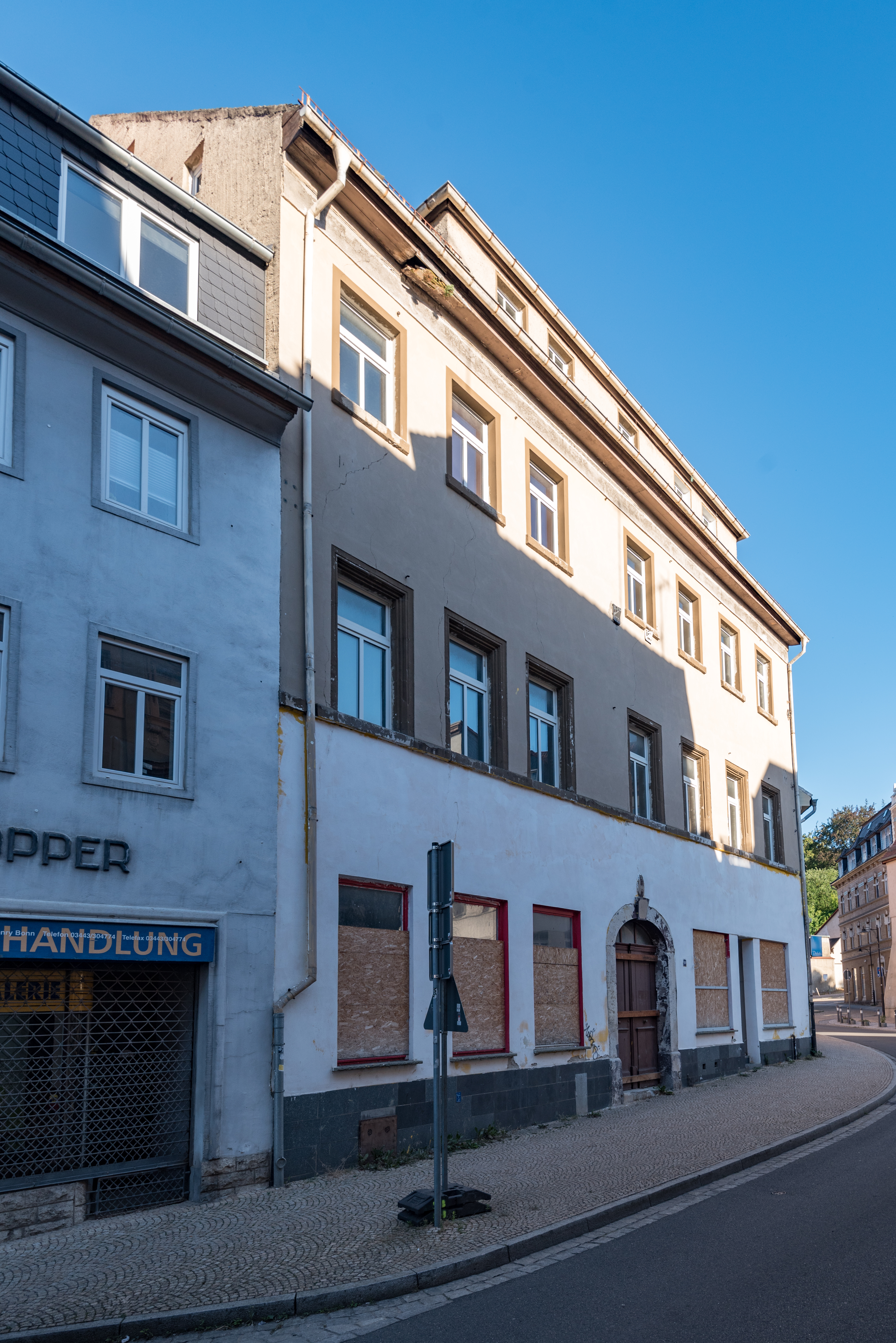 Weißenfels, Große Burgstraße 10